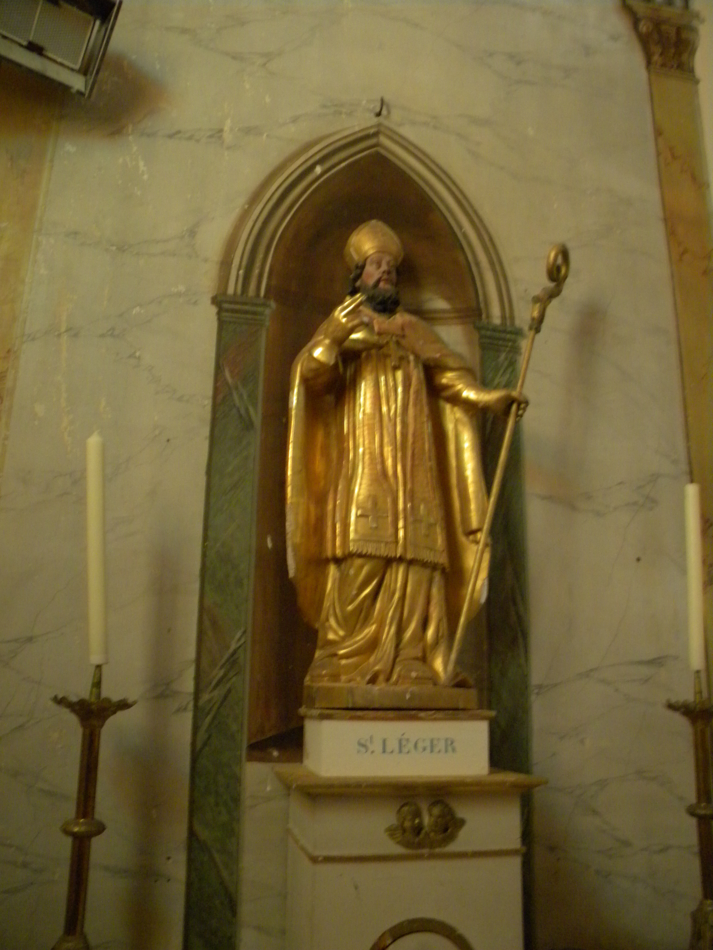 Statue de saint Léger dans l'église de Meuilley